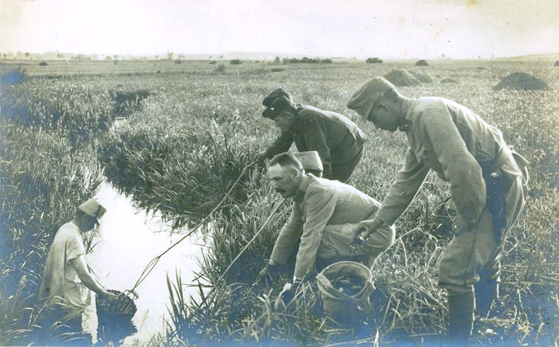 Снимка на австро-унгарски хусари ловящи раци в блатата край фронтовата линия.